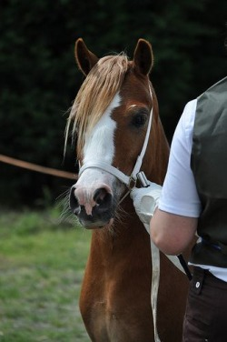 welsh A